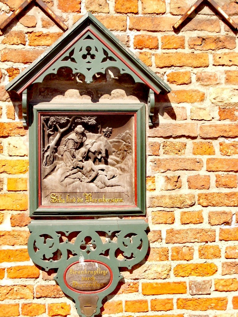 Öffentlicher Opferstock an der Ostfassade der Pastorenhäuser von der Jakobikirche.